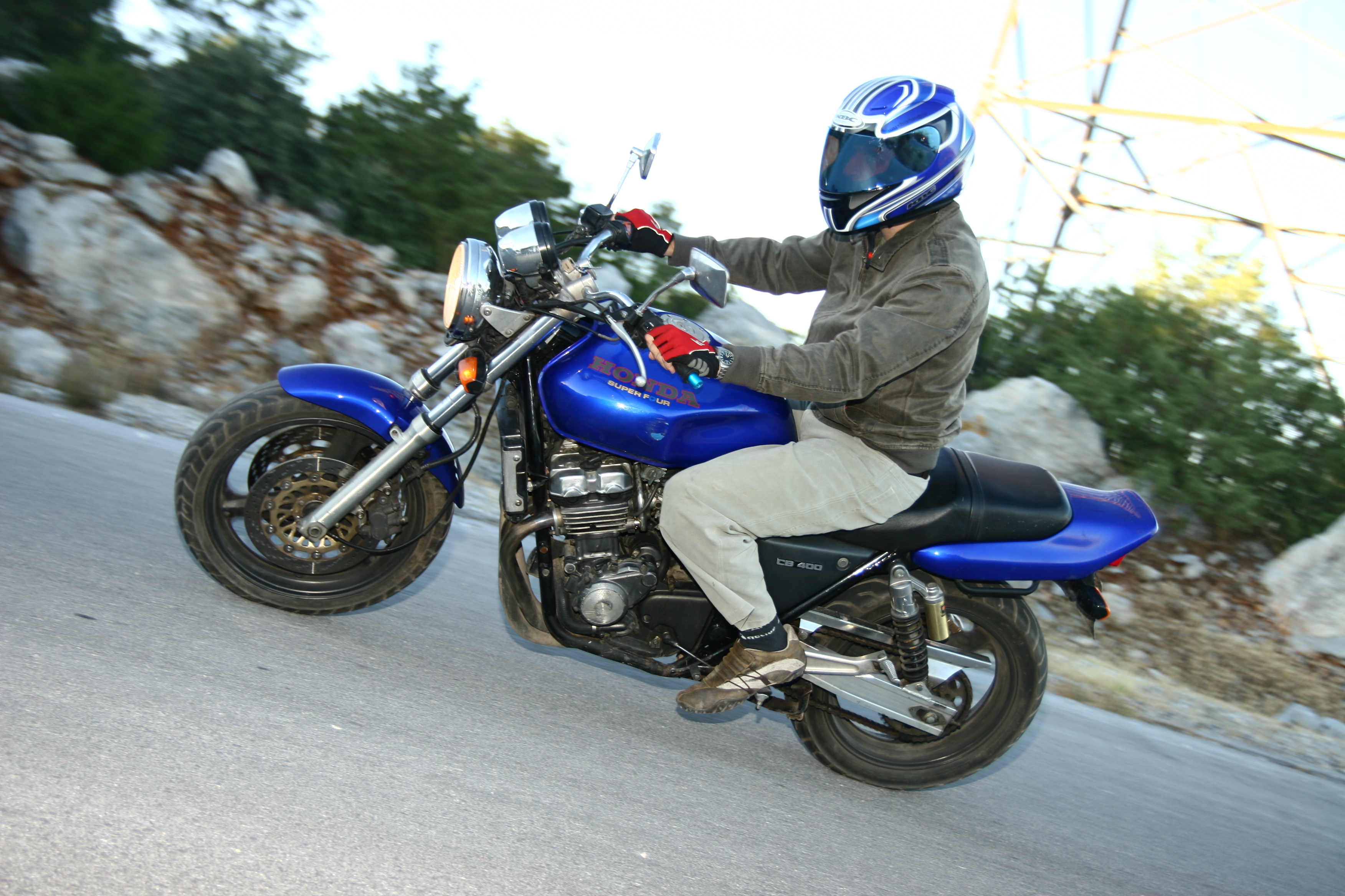 CB400 Super Four